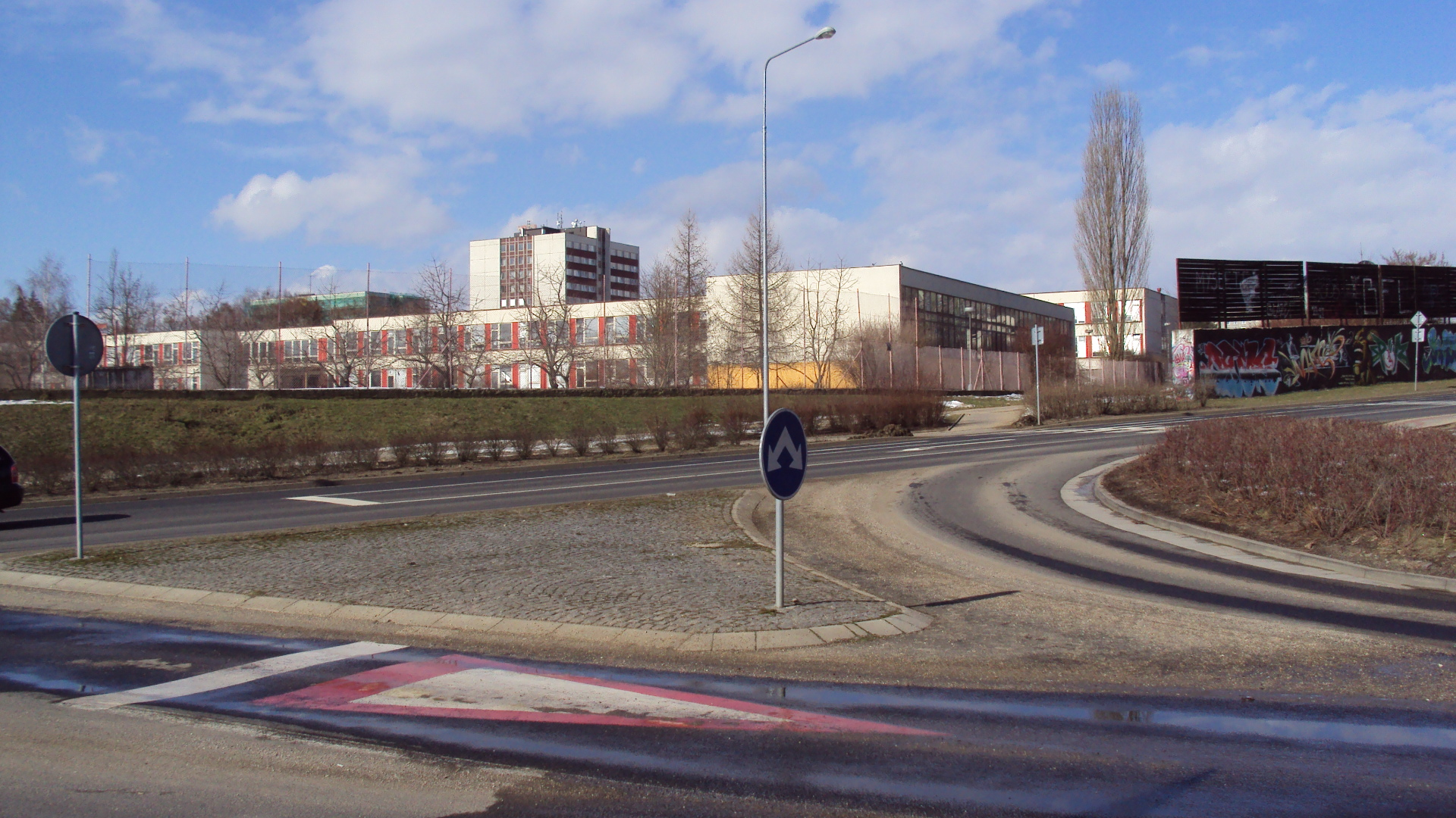 Základní škola Špičák zespodu, malá část areálu